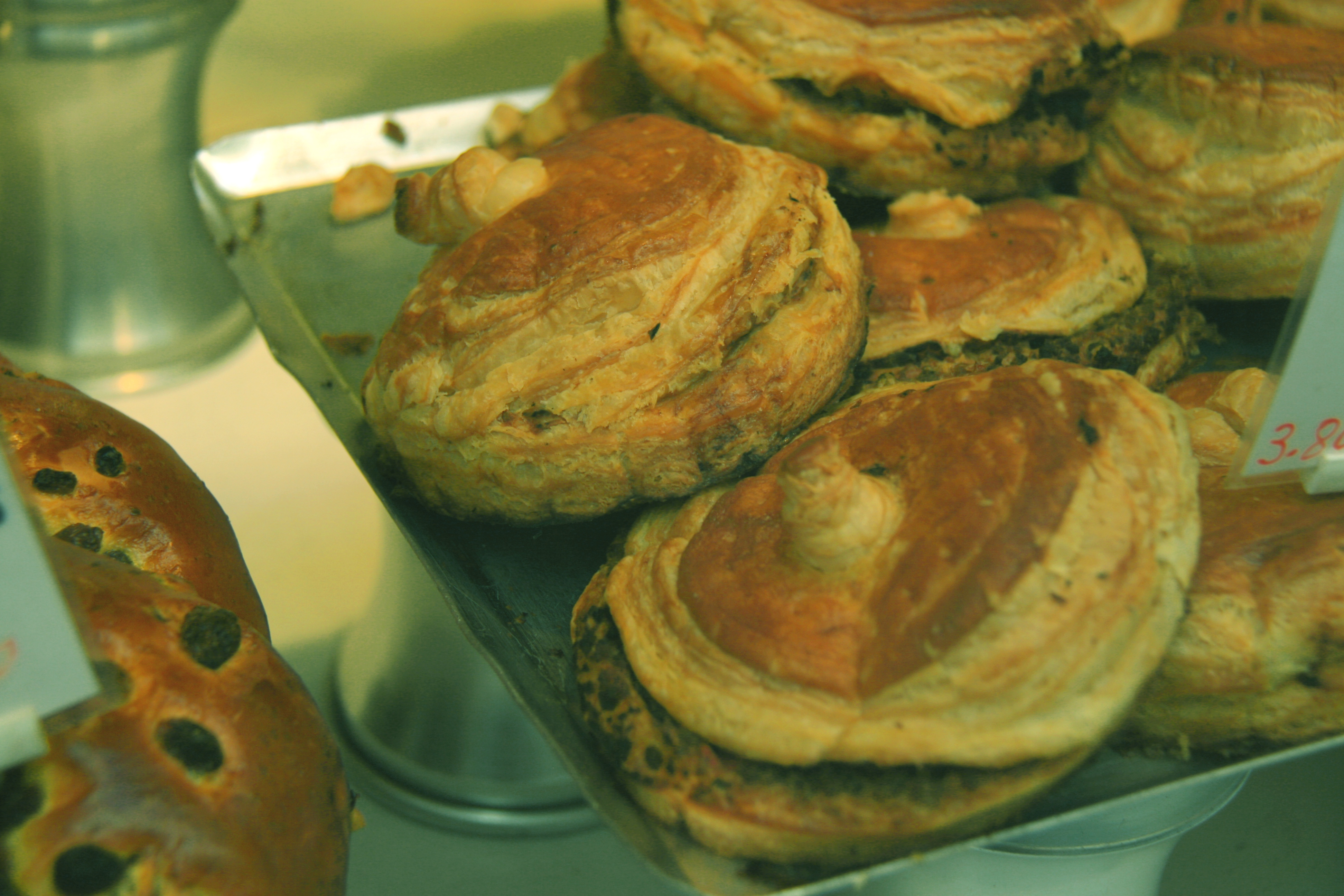 Hojaldres de carne picada (Pastelería "el Pozo" - Madrid)